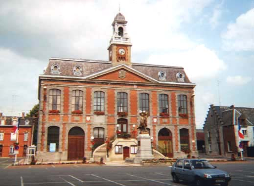 Hôtel de ville de Landrecies